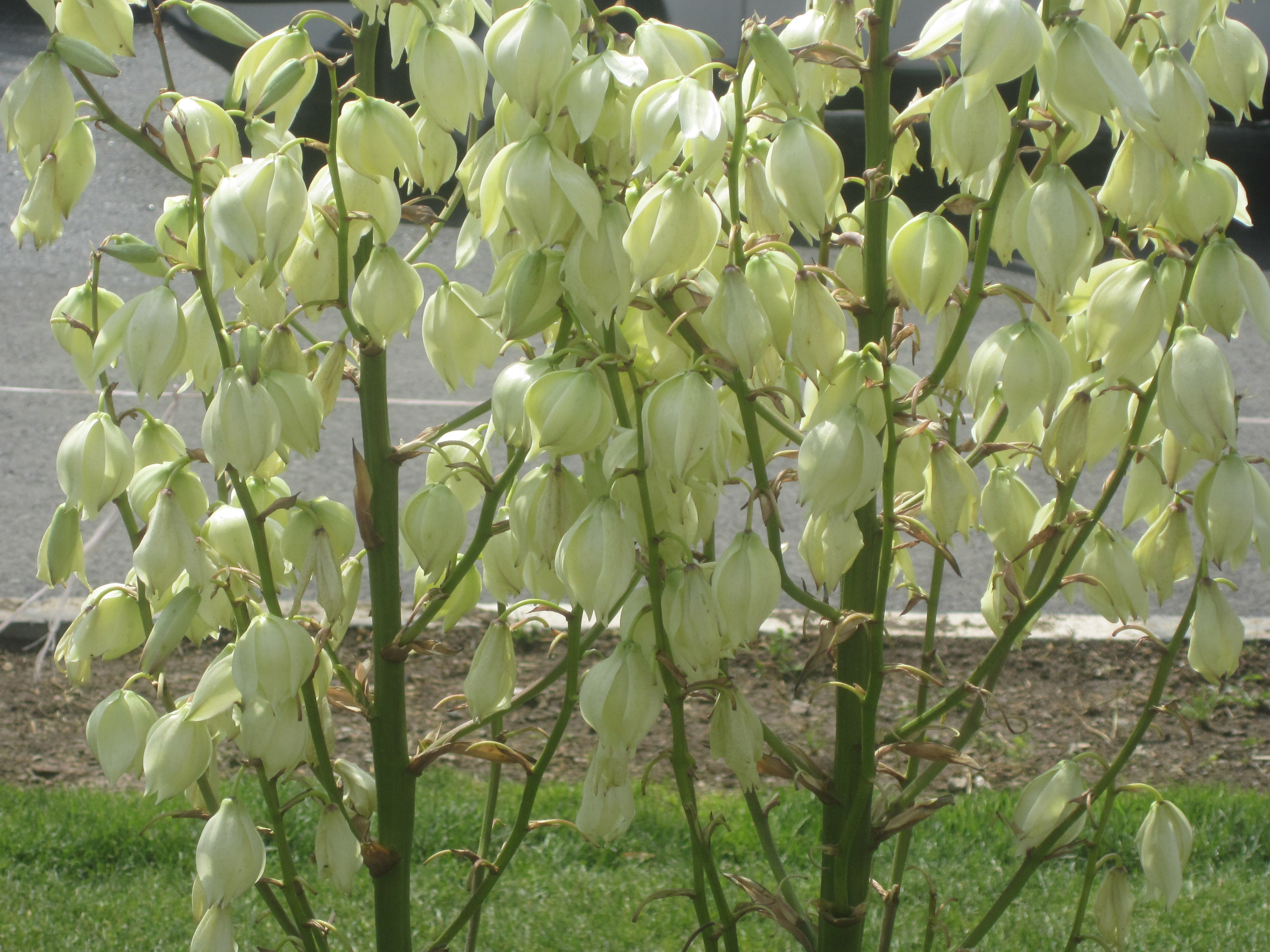 گل ها و شاخه های یوکای باشکوه (یوکا گلوریوسا)